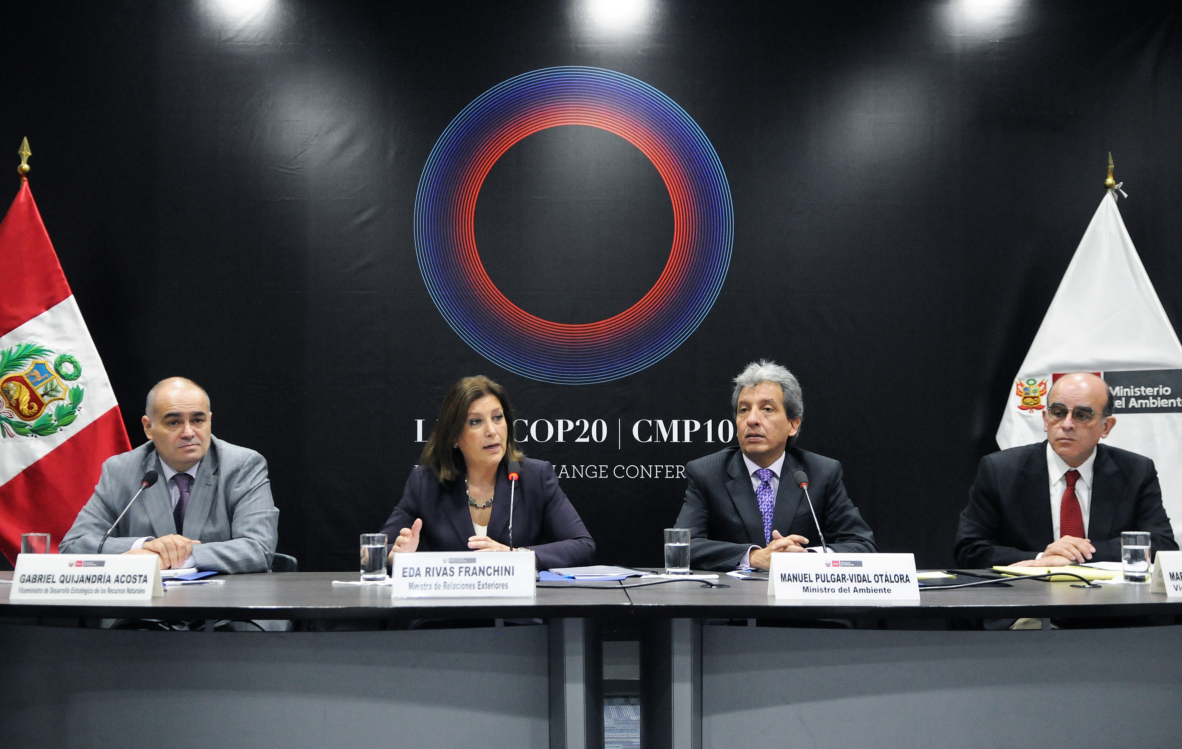 La Ministra de Relaciones Exteriores, Eda Rivas y el Ministro del Ambiente, Manuel Pulgar, participaron conjuntamente en la presentación del logo oficial de la COP20, la Cumbre de Cambio Climático de las Naciones Unidas que se realizará en Lima del 1 al 12 de diciembre del 2014. Durante la presentación, la Canciller destacó la importancia del cambio climático, que se ha convertido en una prioridad de la política exterior del Perú, y que es entendido por este Gobierno como parte de un desafío en materia de desarrollo, con implicancias económicas, sociales y ambientales.